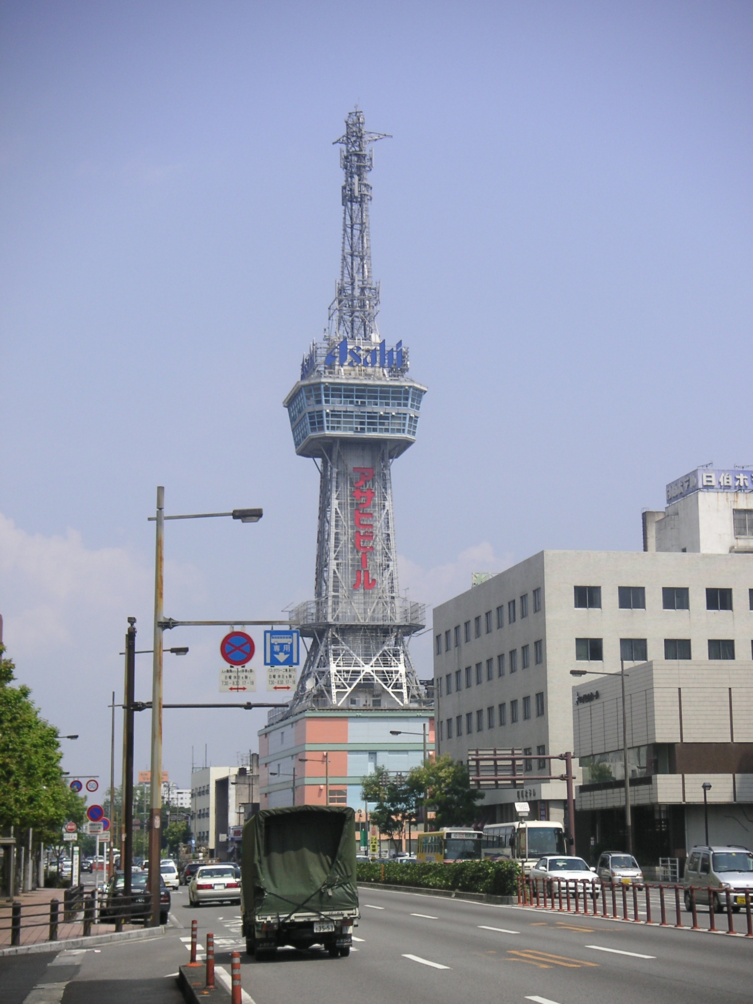 Beppu Tower in Beppu, Oita, Japan